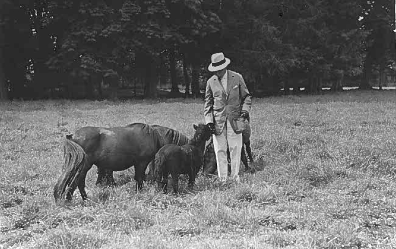 Photo prise dans le domaine du château du Vivier, à Fontenay-Trésigny (Seine-et-Marne) par mon grand-père au début des années 1930 : le vicomte de Perthuis et son élevage de shetlands.